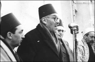 زعيم ليبي المصدر محمد محمد المـفــتي – ليبيا اليوم